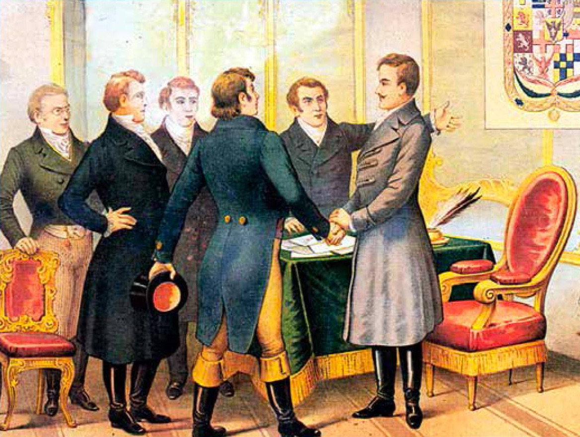 Carlo Alberto in Colloquoi con i Liberali